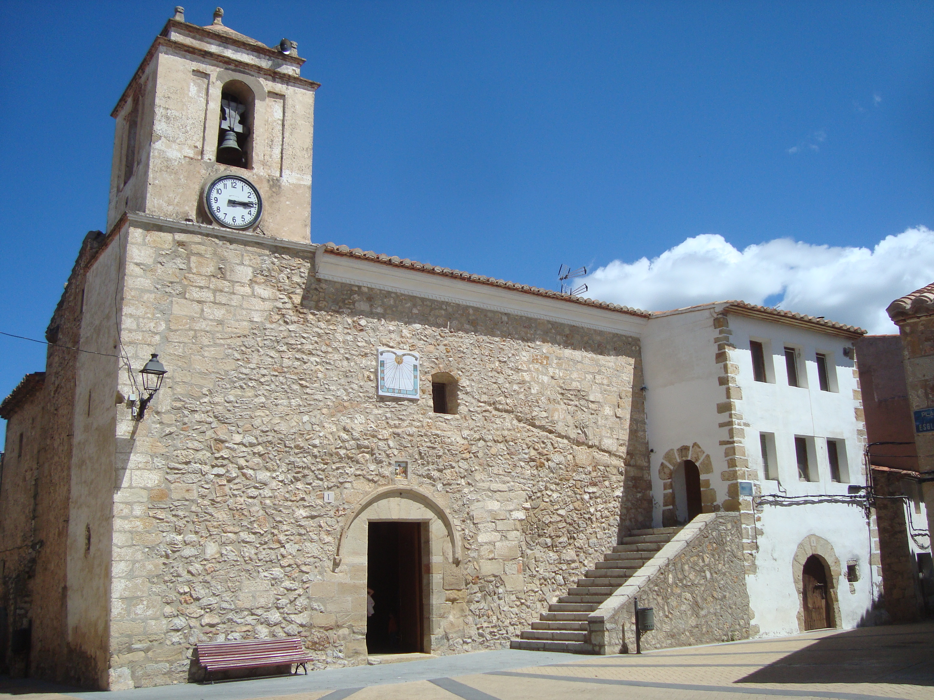 Església parroquial de Sant Joan Baptista (Benafigos) 04.025-004.